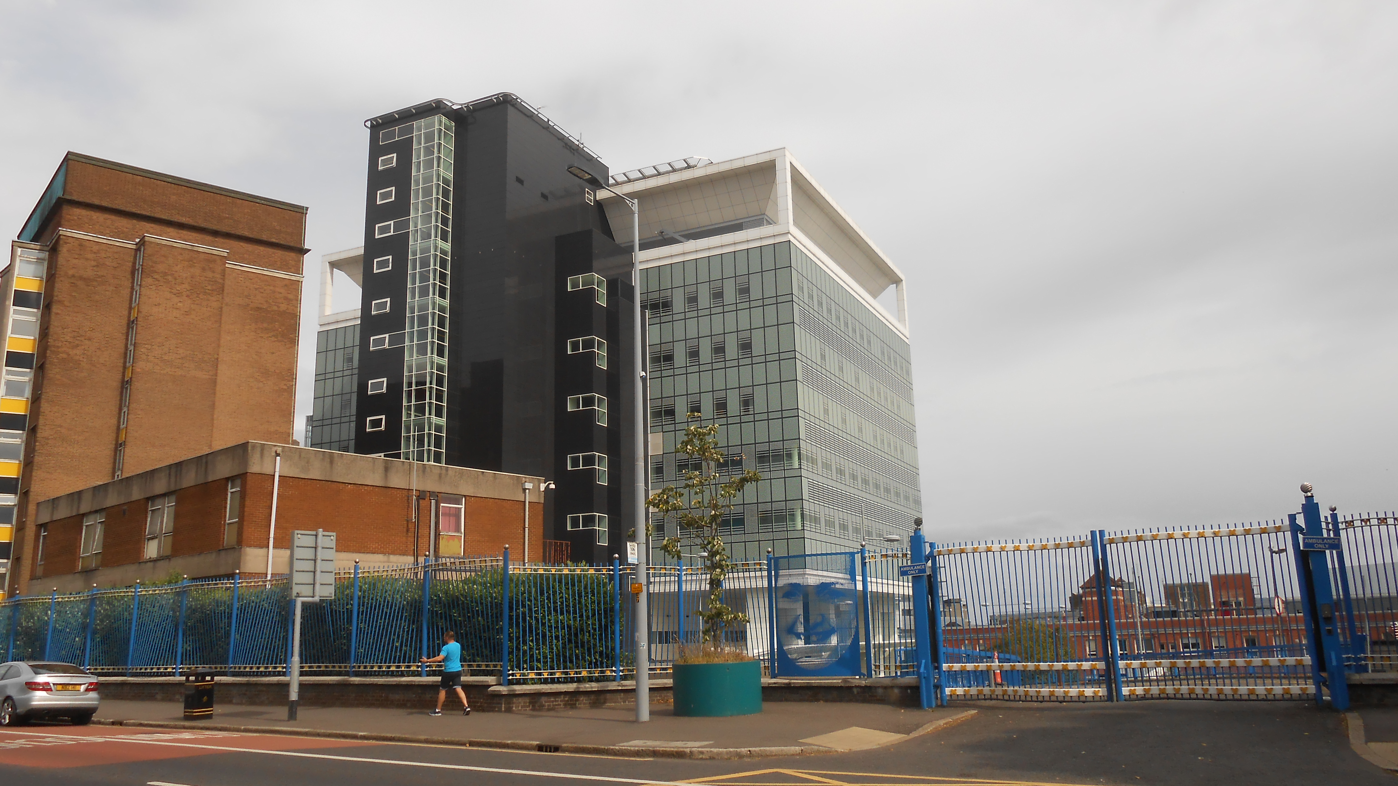 Teilansicht des Royal Hospitals in Belfast, im irisch-republikanisch dominierten Stadtteil Falls Road.